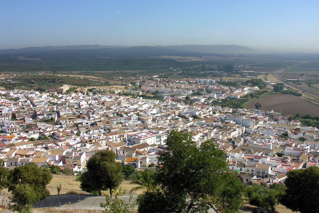 Vue sur la ville d'Almodóvar del Río.